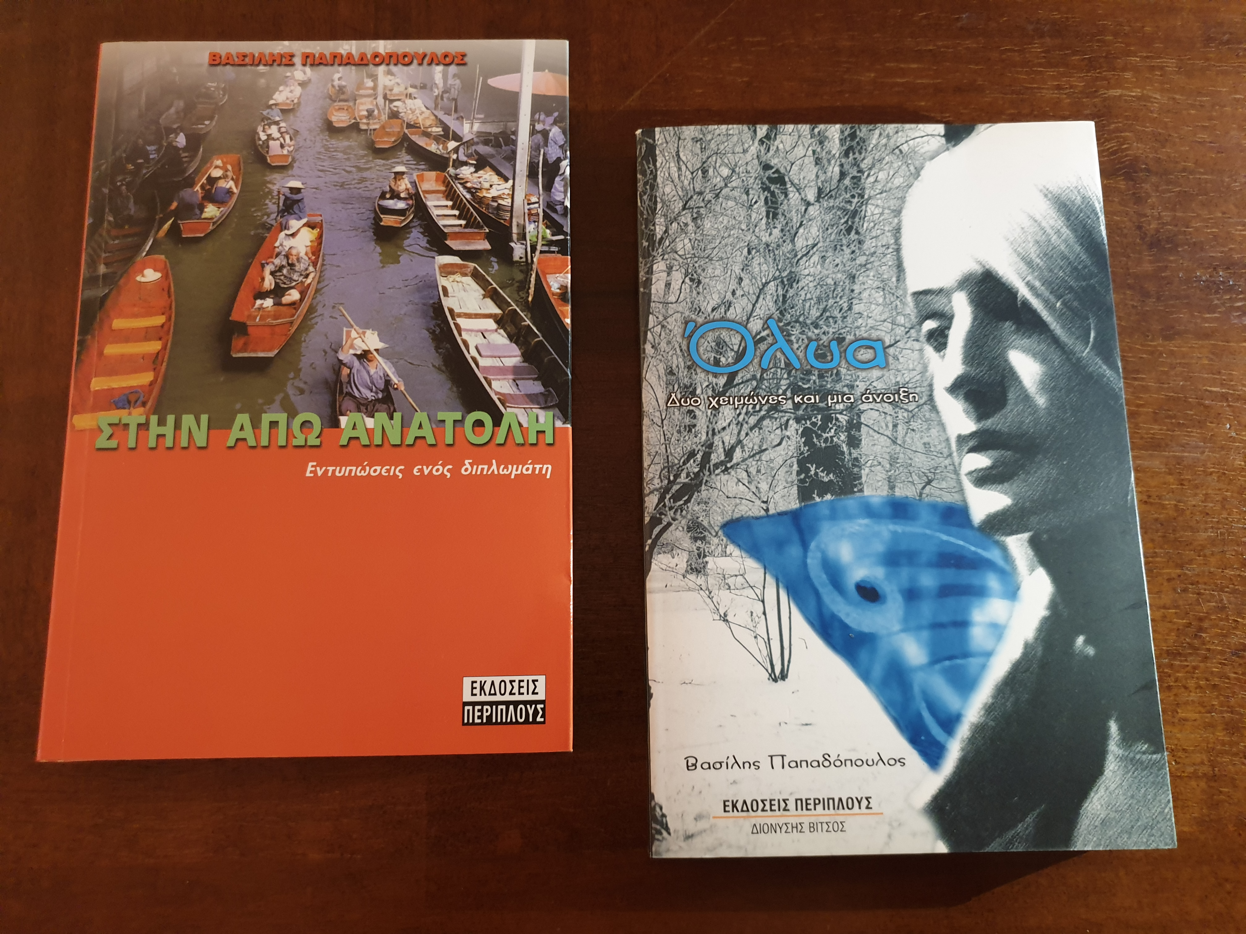 ΔΙΗΓΉΜΑΤΑ ΒΑΣΙΛΗΣ ΠΑΠΑΔΟΠΟΥΛΟΣ ( 2002-2008)